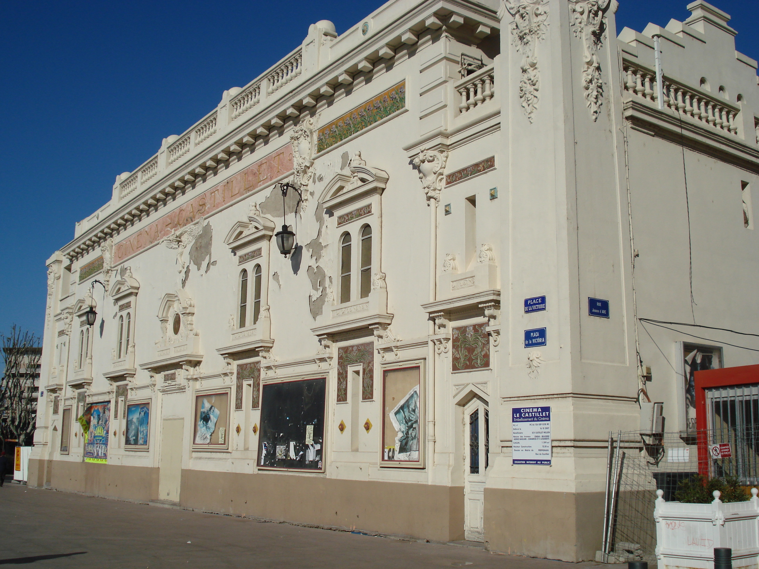 Perpignan